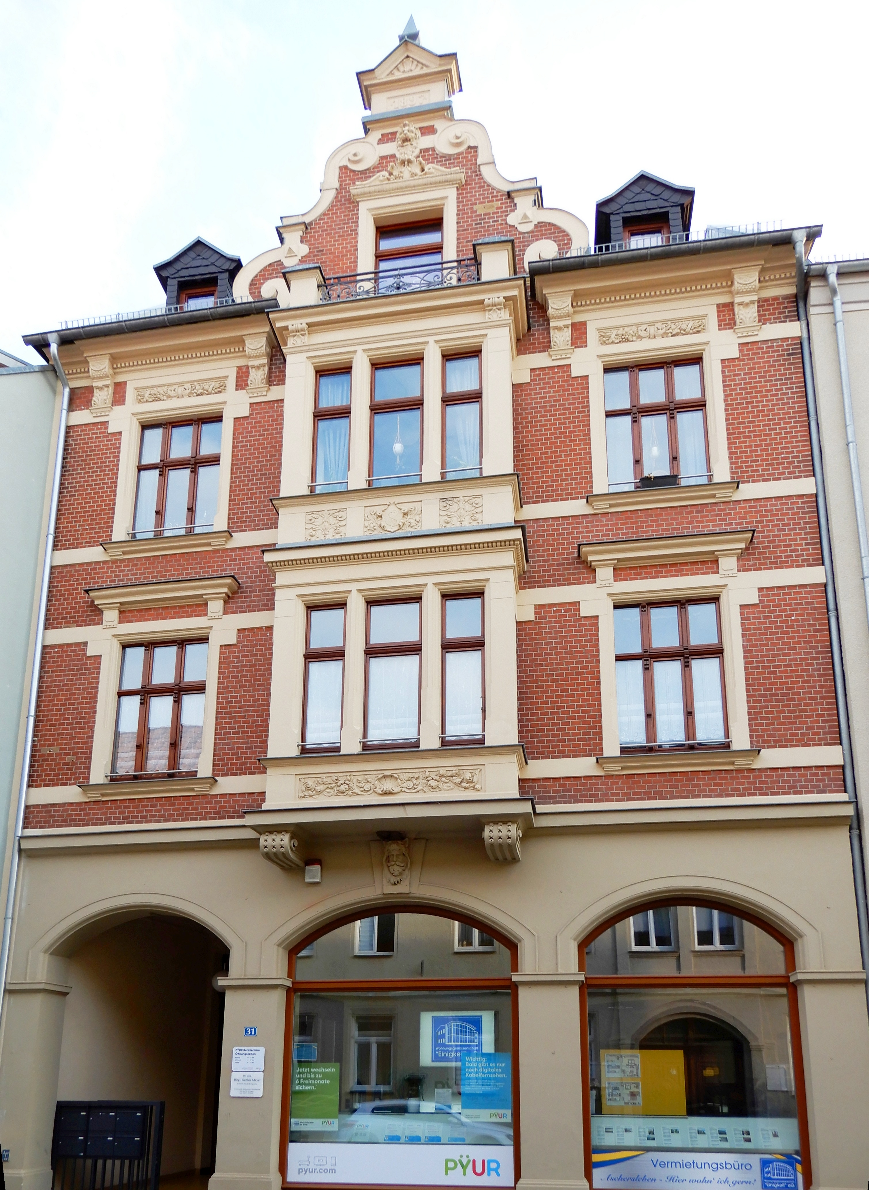 Gebäude Über den Steinen 31 in Aschersleben